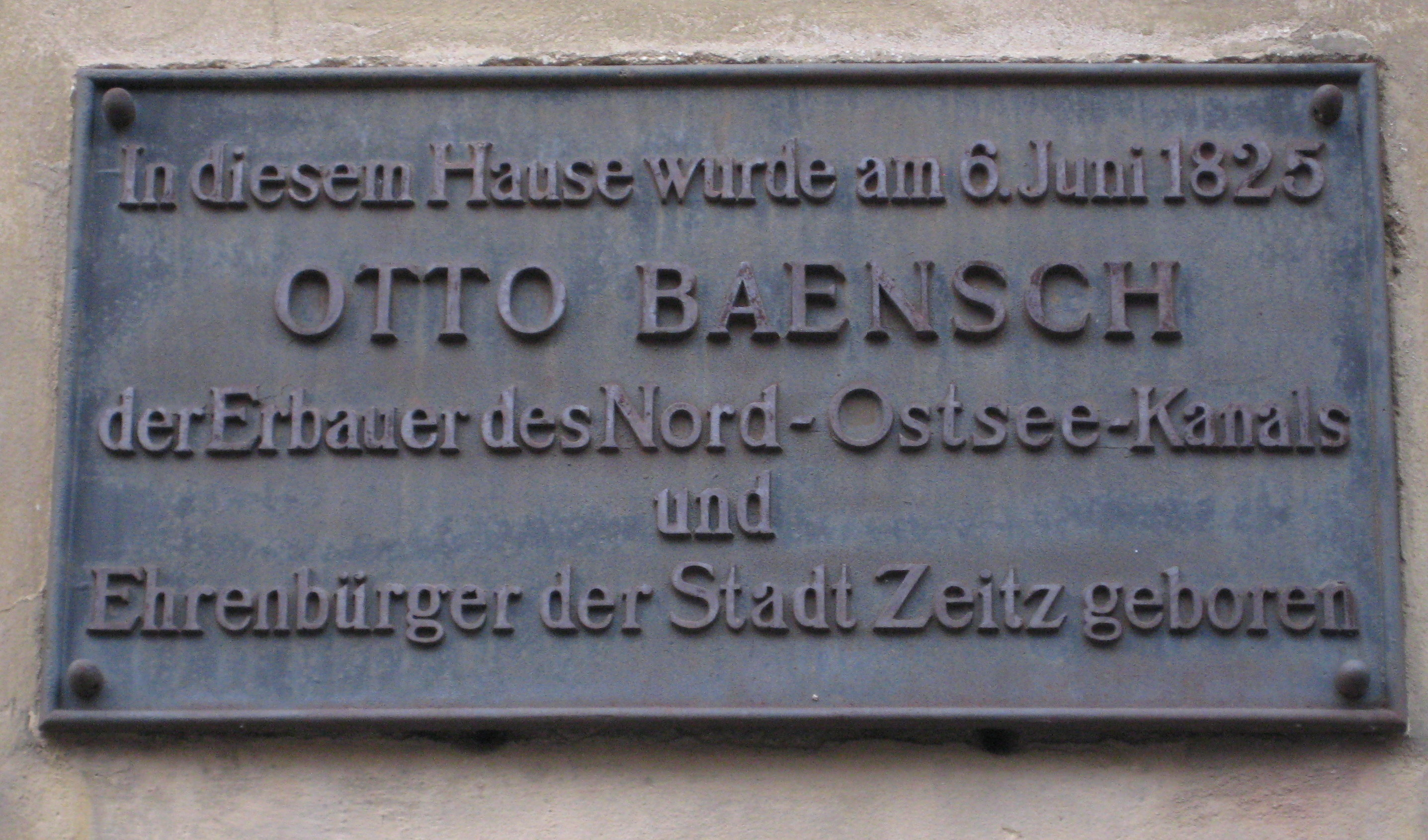 Otto Baensch, Erbauer des Nord-Ostsee-Kanals